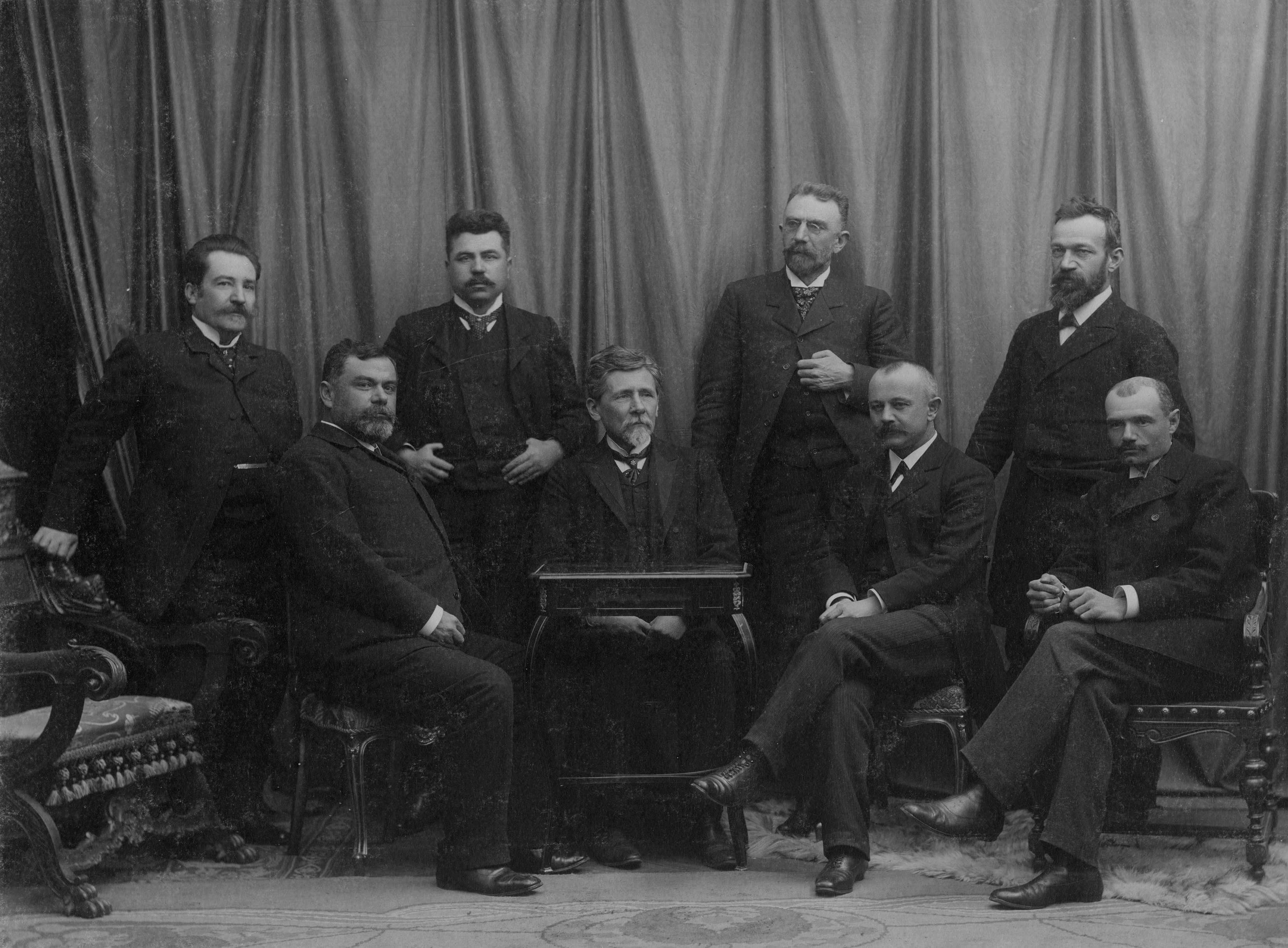 Првих осам редовних професора Београдског универзитета, 1905. године. Седе, с лева Јован Жујовић, Сима Лозанић, Јован Цвијић, Михаило Петровић Алас; стоје, с лева Андра Стевановић, Драгољуб Павловић, Милић Радовановић и Љубомир Јовановић.